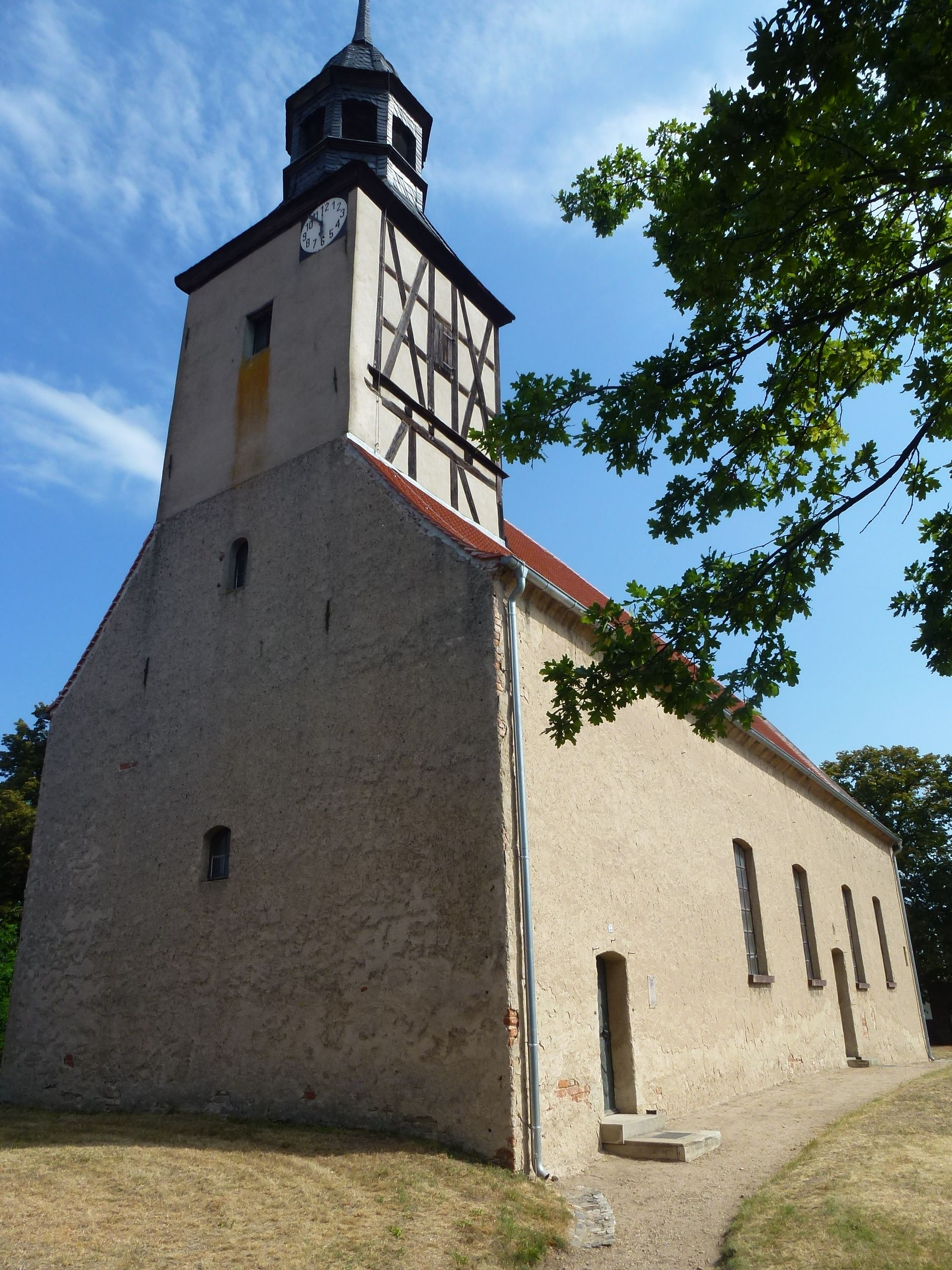 Wahrburg (Stendal) Am Glockenberg, Evangelische Christuskirche, Baudenkmal